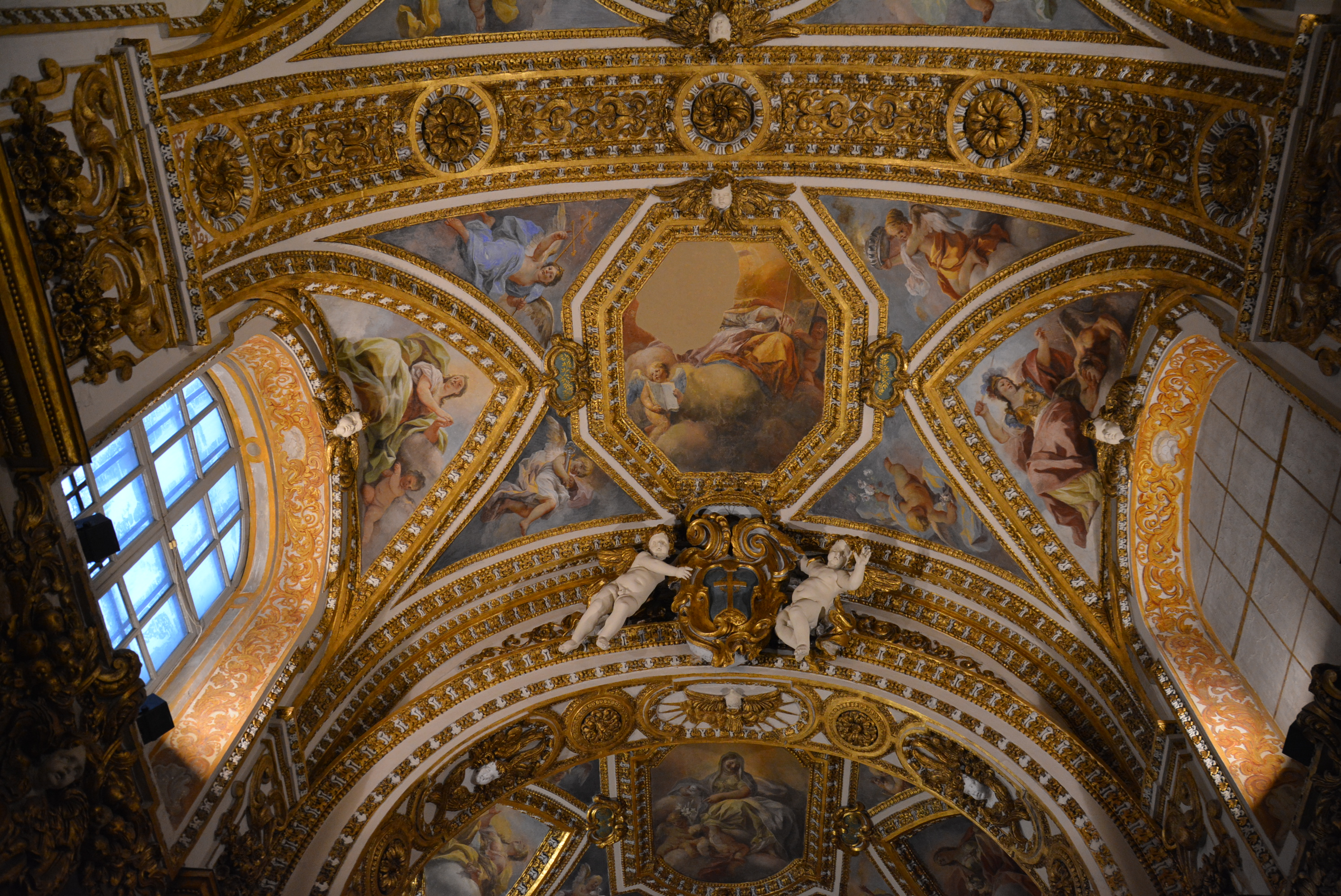 La sacrestia della basilica di San Paolo Maggiore a Napoli